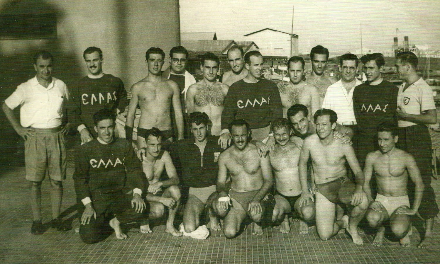 La nazionale di pallanuoto della Grecia ai I Giochi del Mediterraneo di Alessandria 1951.